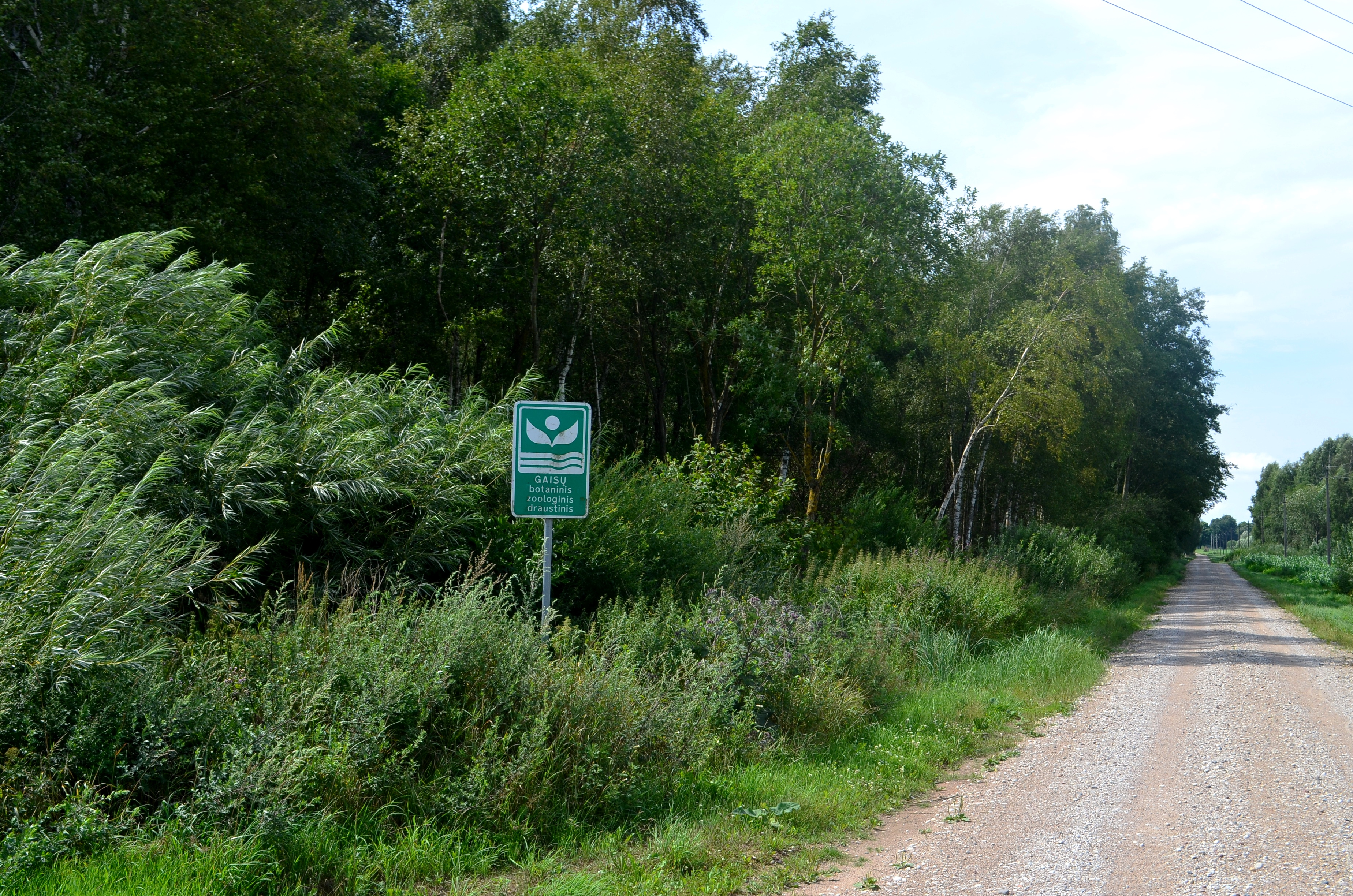 Gaisų botaninis-zoologinis draustinis, Truskavos sen., Kėdainių raj.